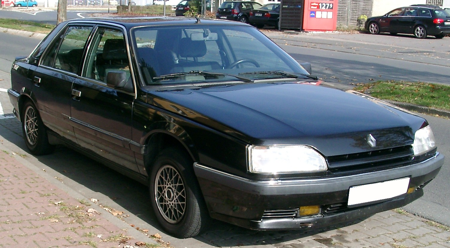 Renault 25